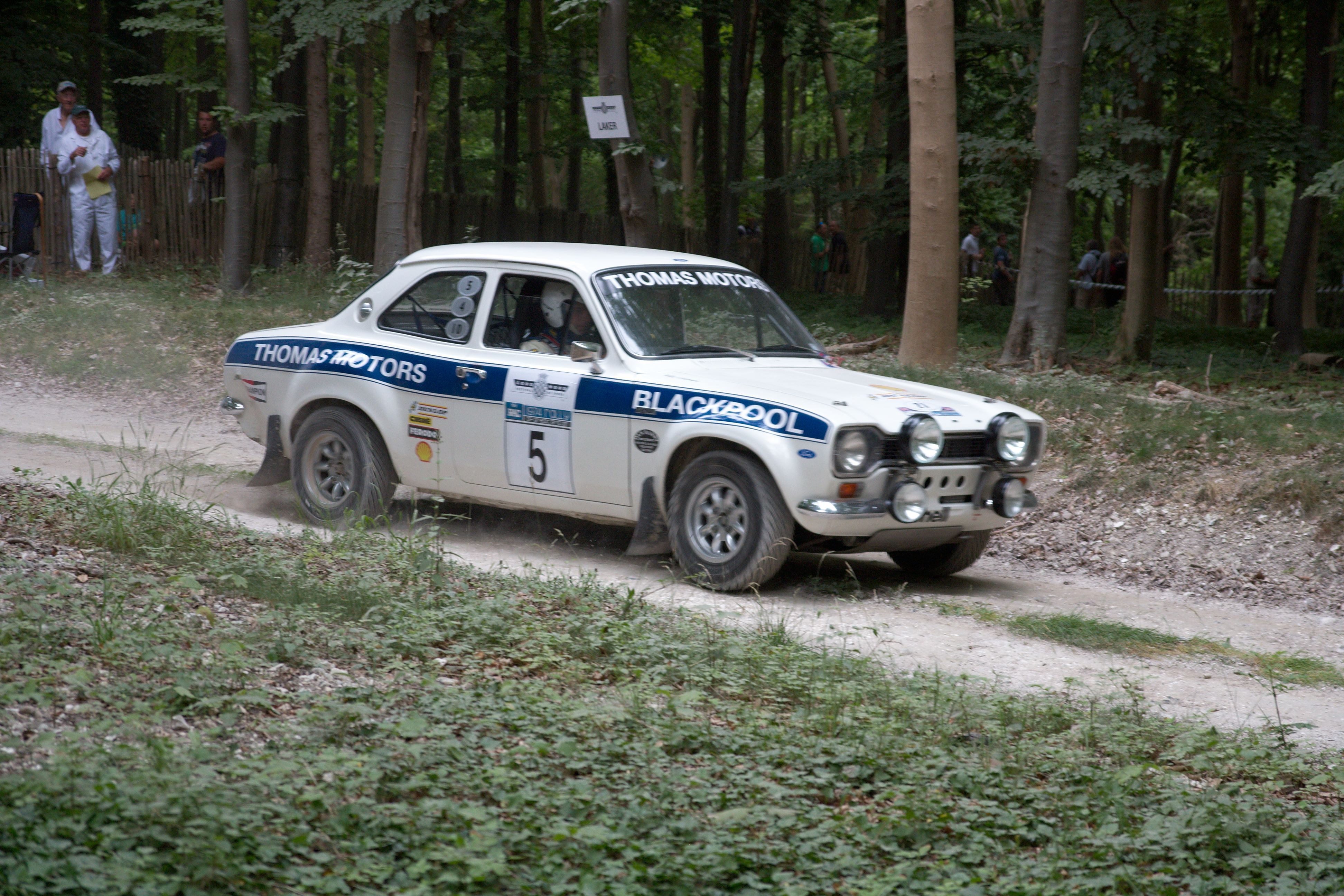 Ford Escort mk1 (Same car)